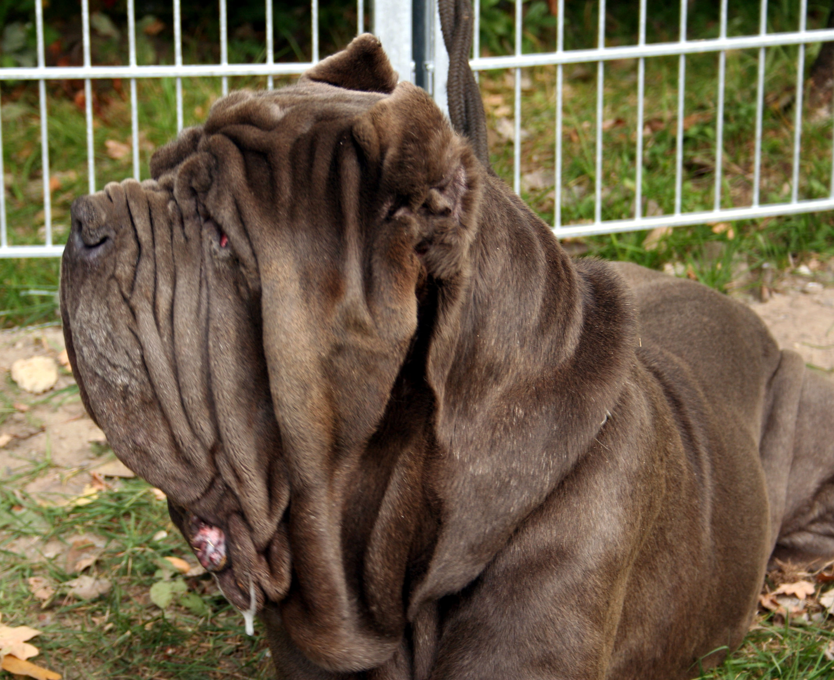 Mastif neapolitański na krajowej wystawie w Rybniku - Kamieniu.